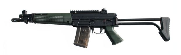 Es el fusil SG 543-1.